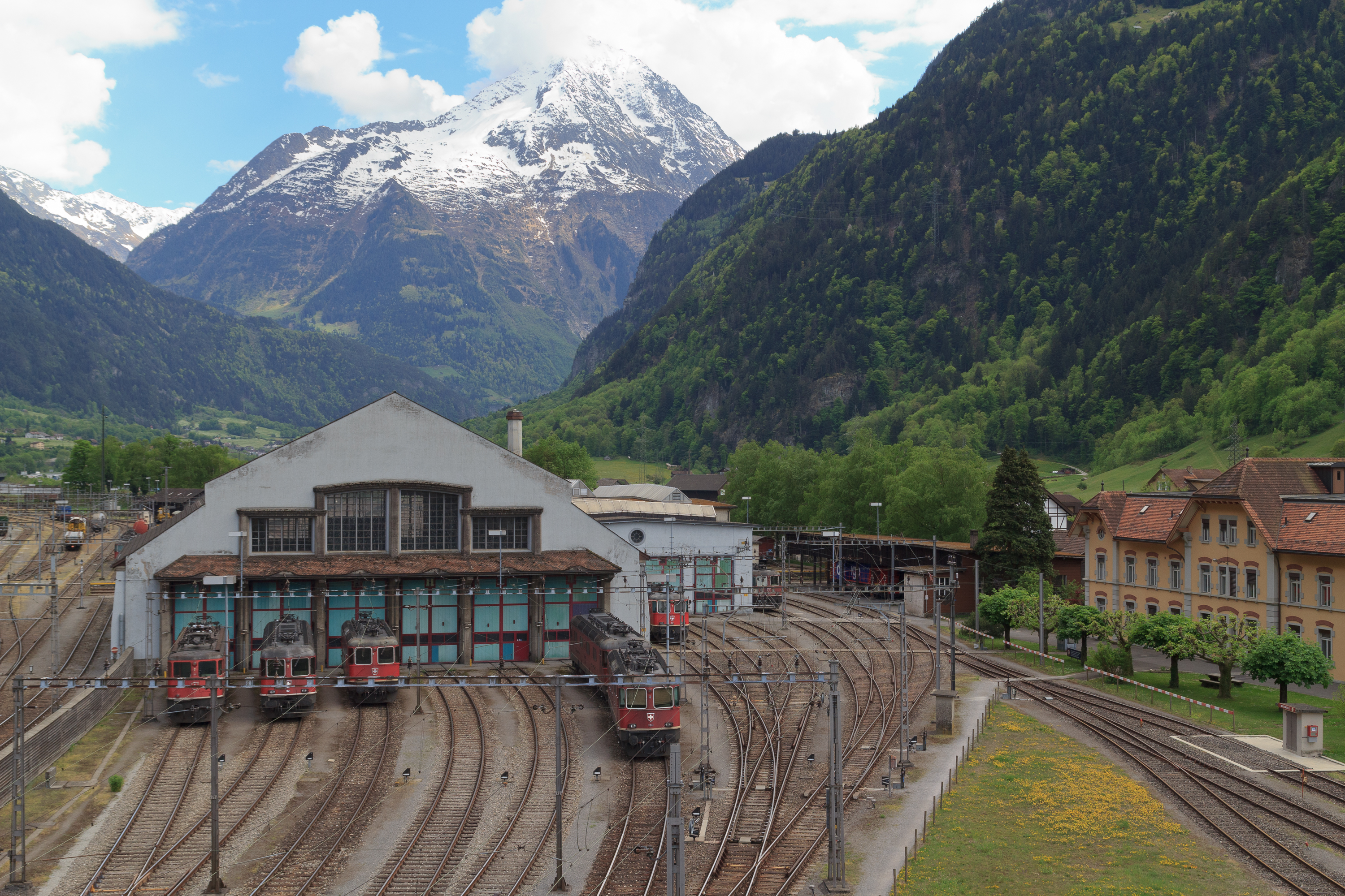 Lokremise in Erstfeld an der Gotthardstrecke